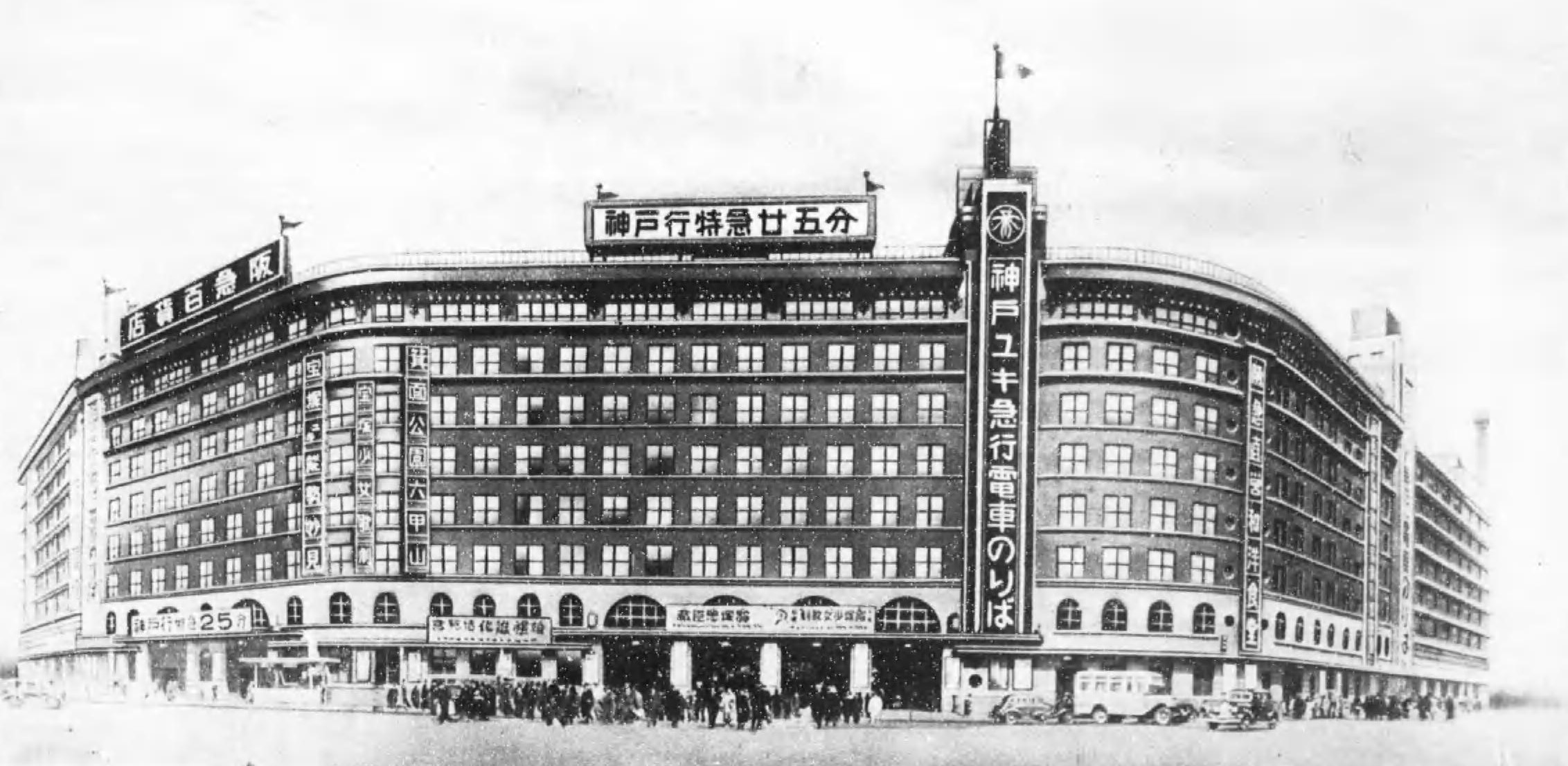 1936年ごろの阪急梅田駅・阪急百貨店。 百貨店新聞社・編『大・阪急』（1936年）巻頭より。